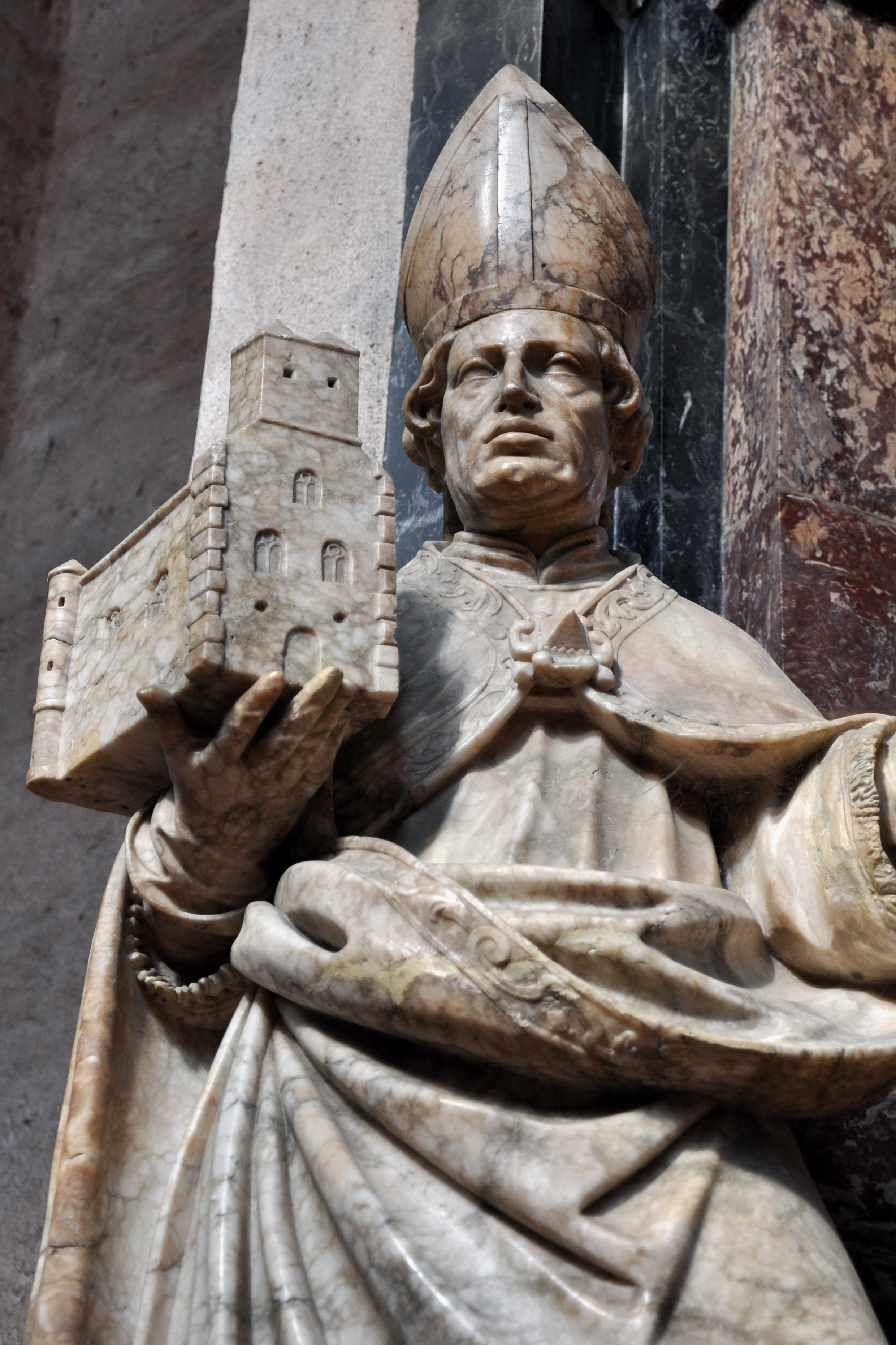 Cathédrale Saint-Pierre de Trèves.Statue en albâtre d'un des autels baroques.